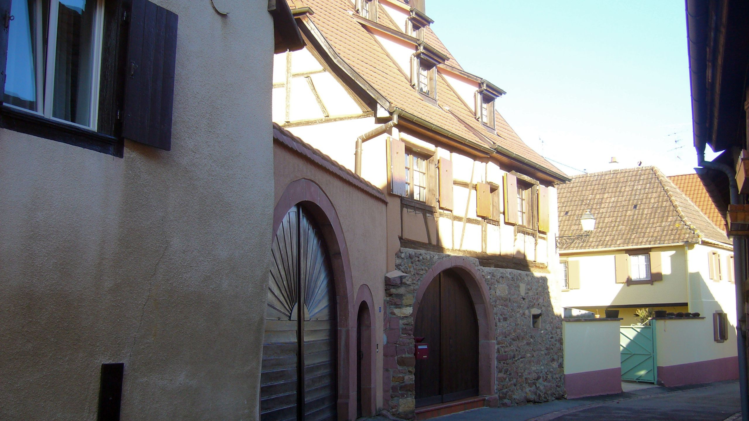 Maison vigneronne, de 1703 située 18, rue des Seigneurs à Hattstatt (Haut-Rhin)